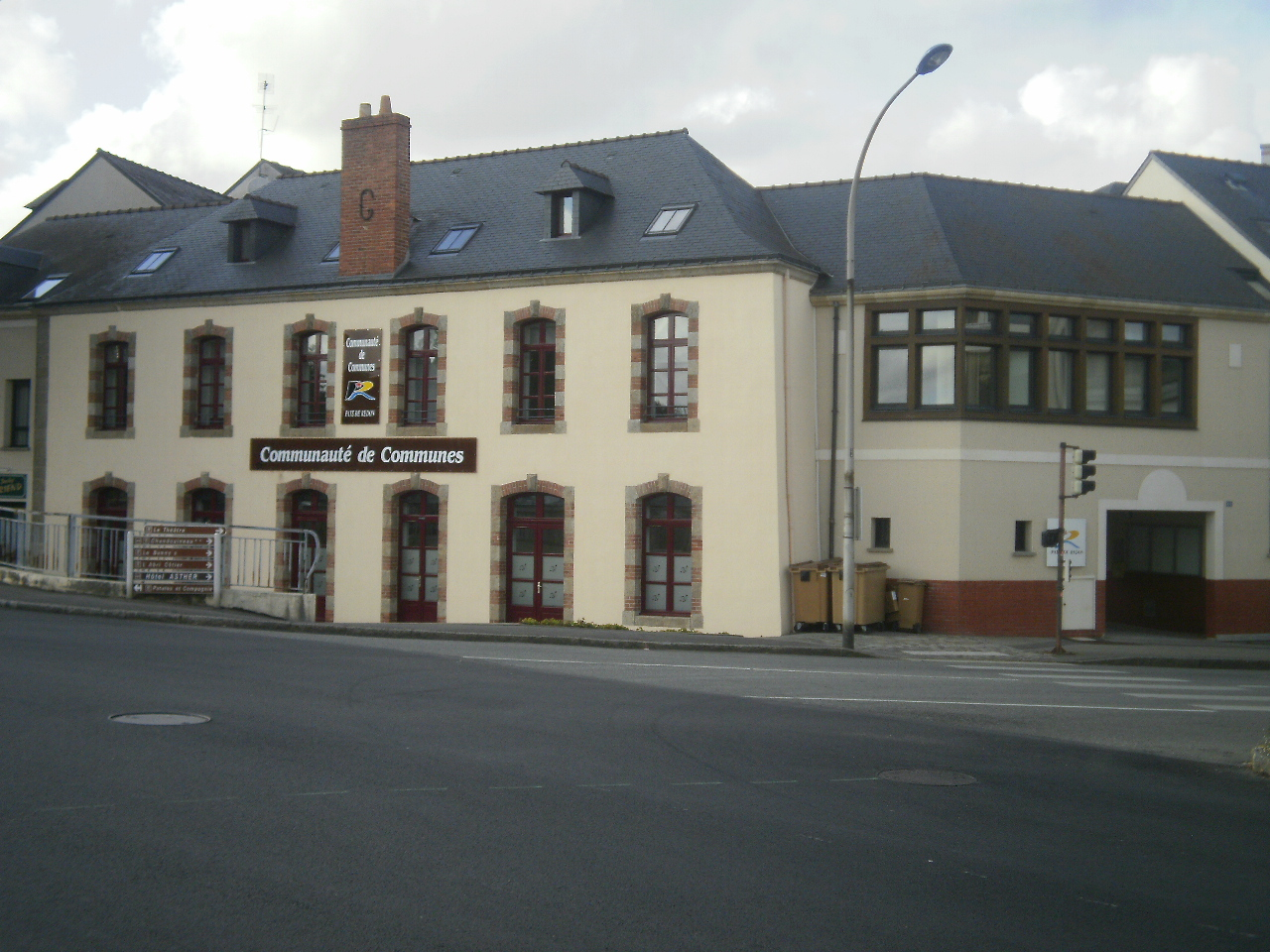 Siège de la communauté de communes du Pays de Redon